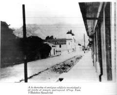 Imagen de 1930 tomada por la familia Tinoco. Cantón de La Unión a inicios del siglo XX.